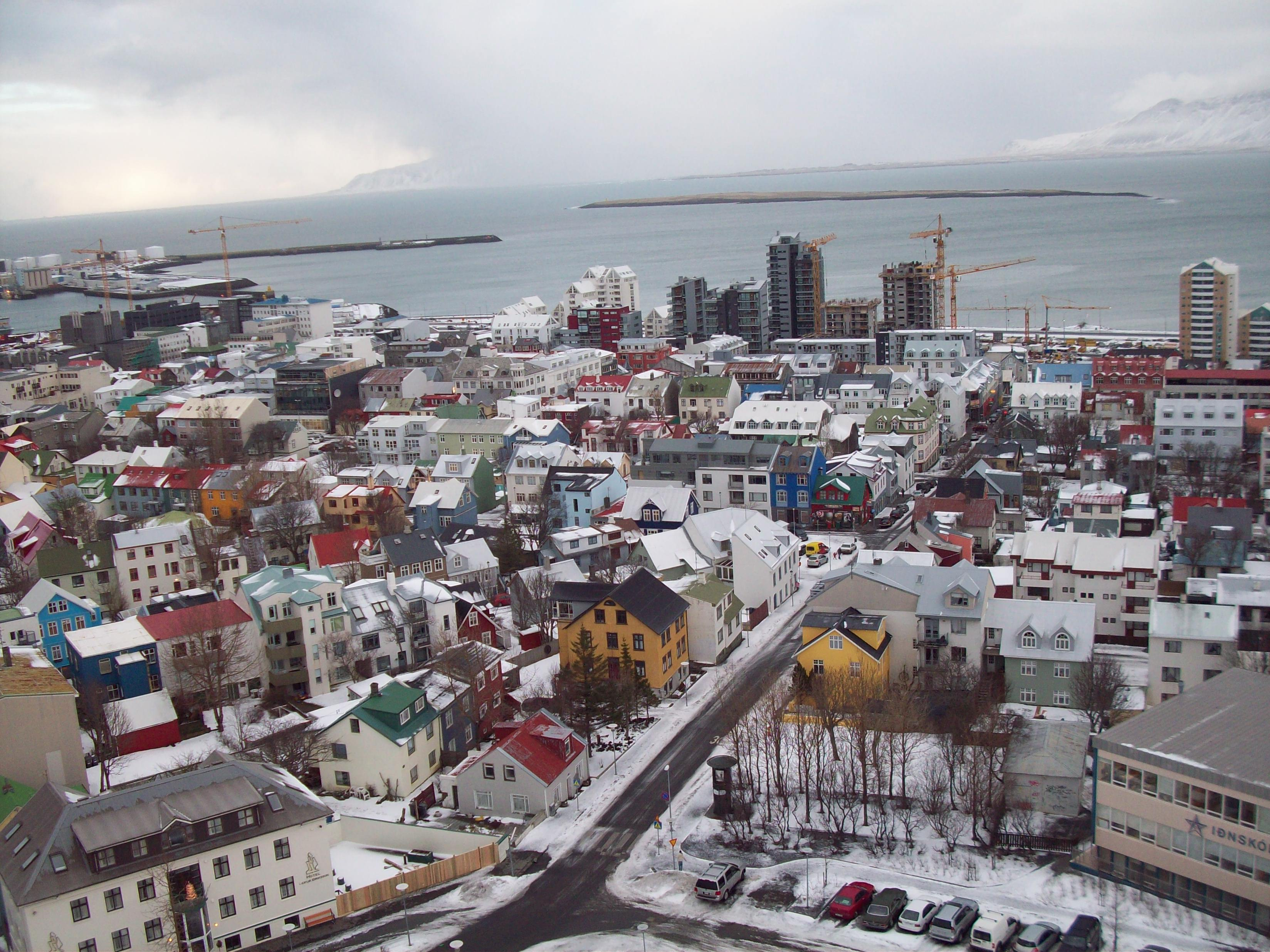 Reykjavík séð úr Hallgrímskirkjuturni